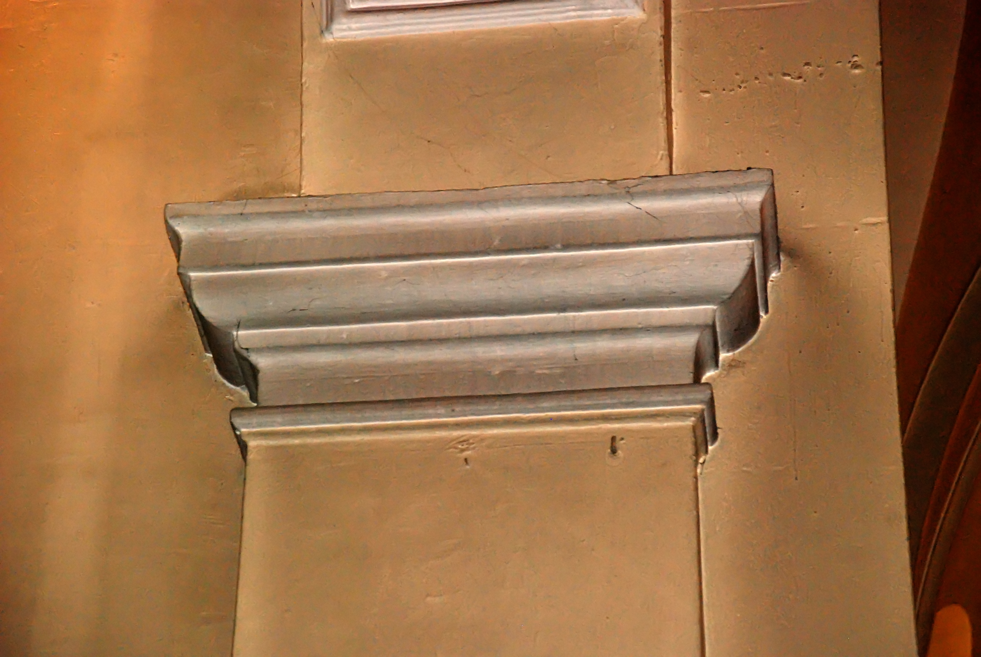 Belgique - Brabant wallon - Ottignies - église Saint-Rémi